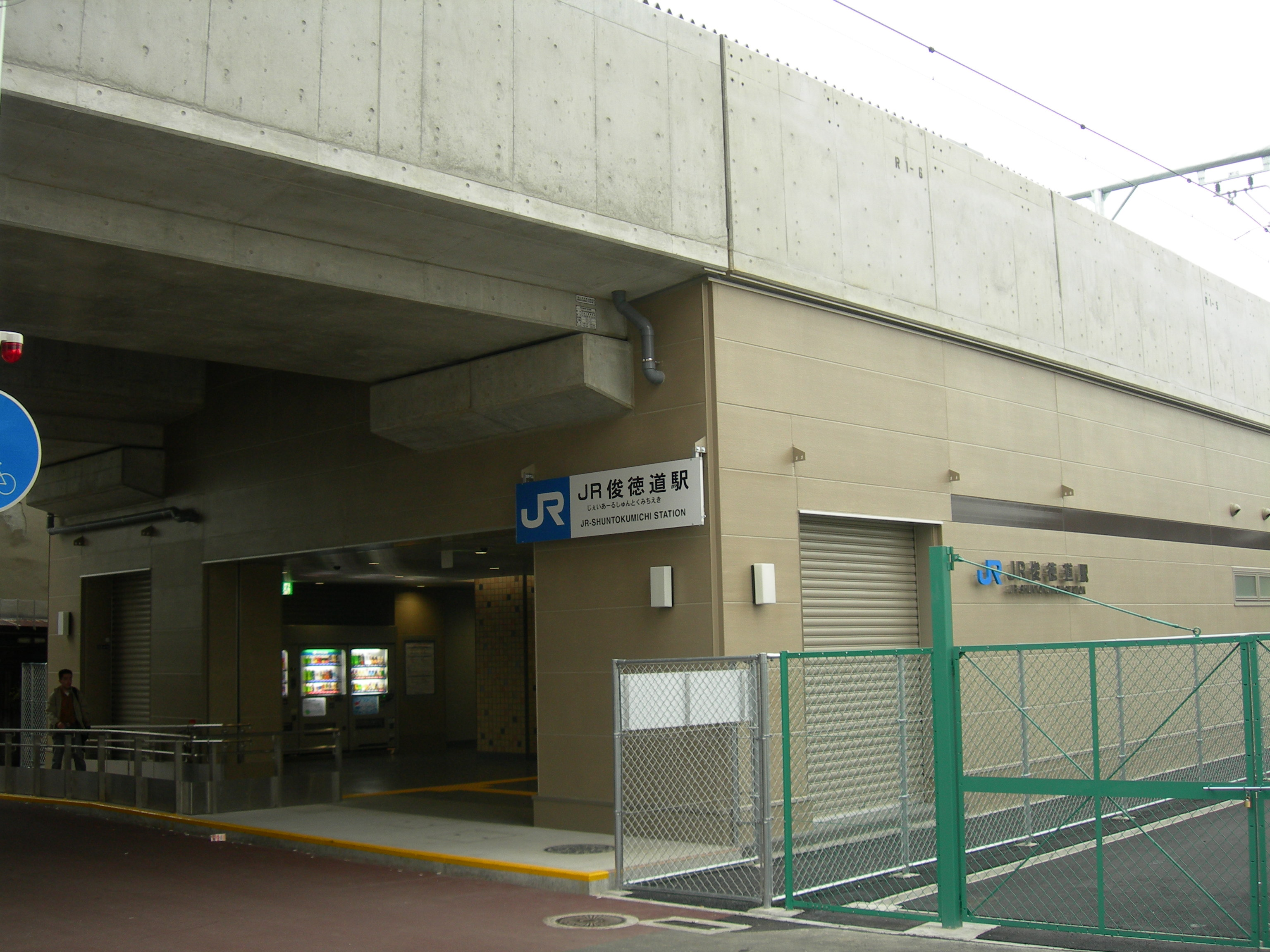 JR俊徳道駅